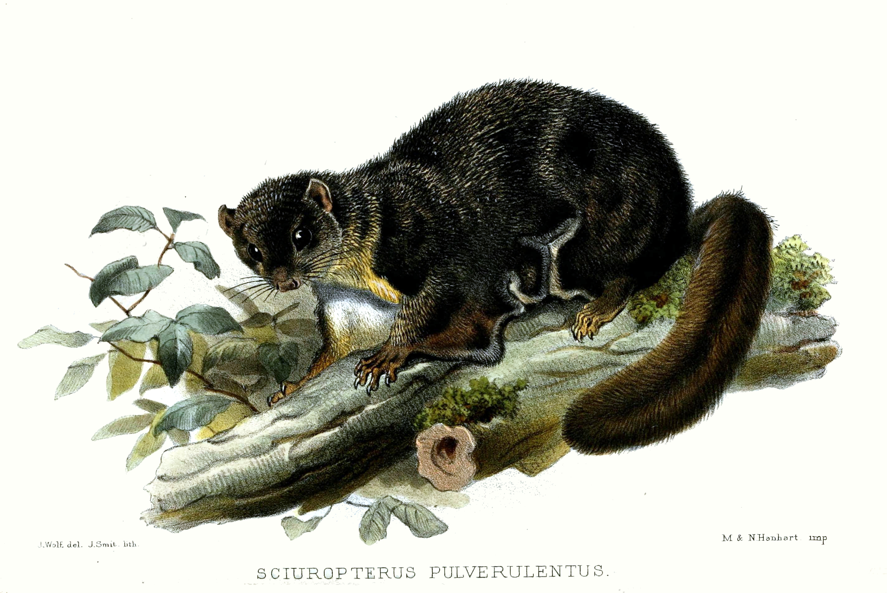 Sciuropterus pulverulentus, e.g. synonym of Pteromyscus pulverulentus